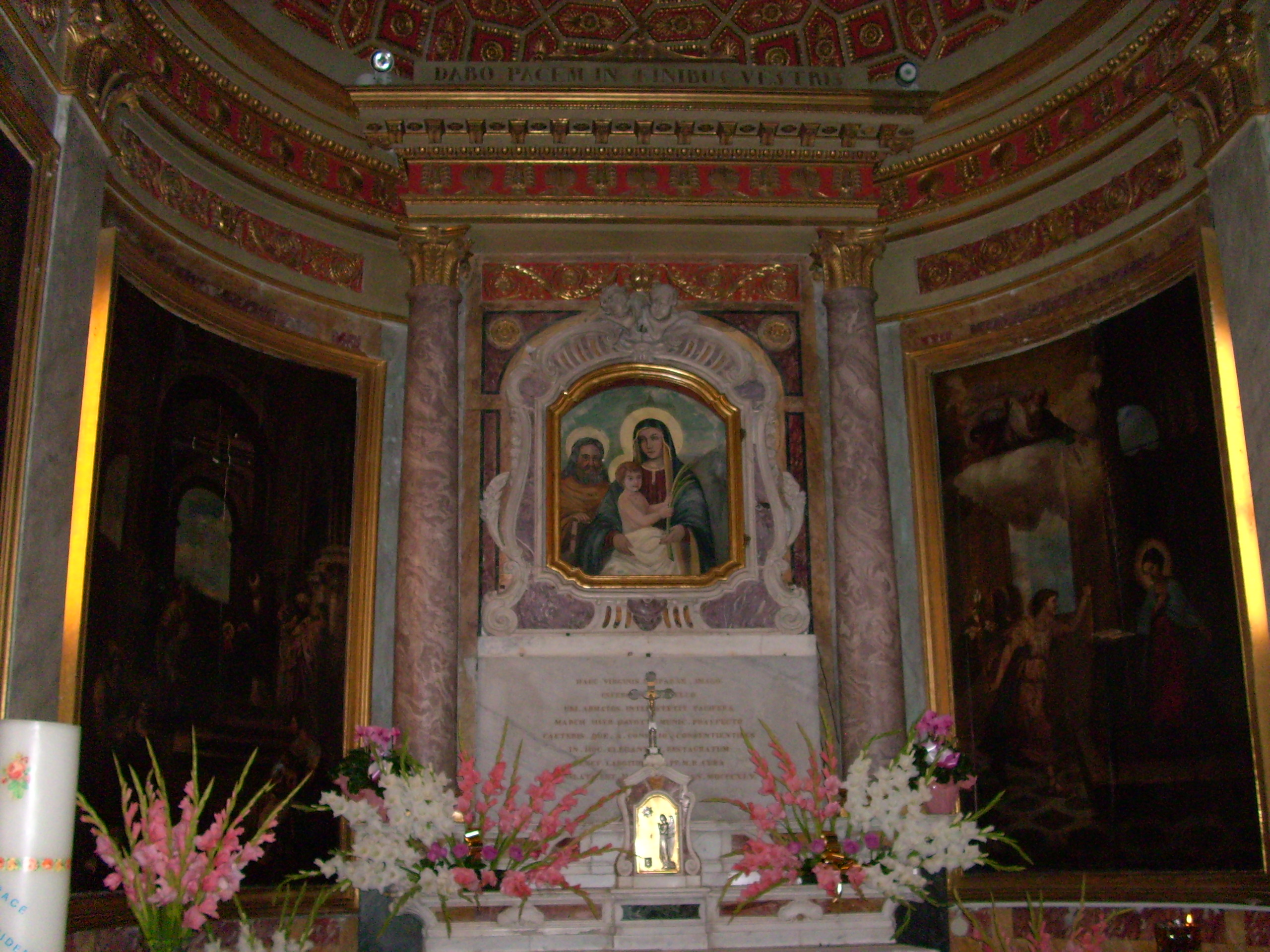 Santuario di Nostra Signora della Pace presso Albisola Superiore, Liguria, Italia